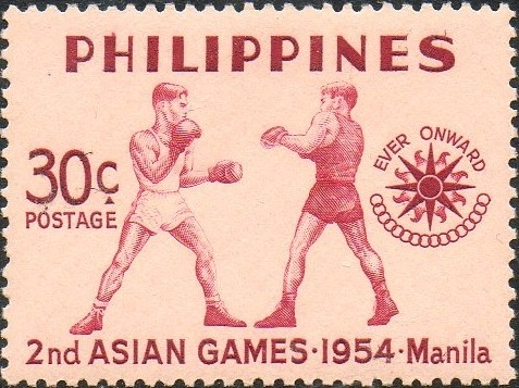 1954 Asian Games